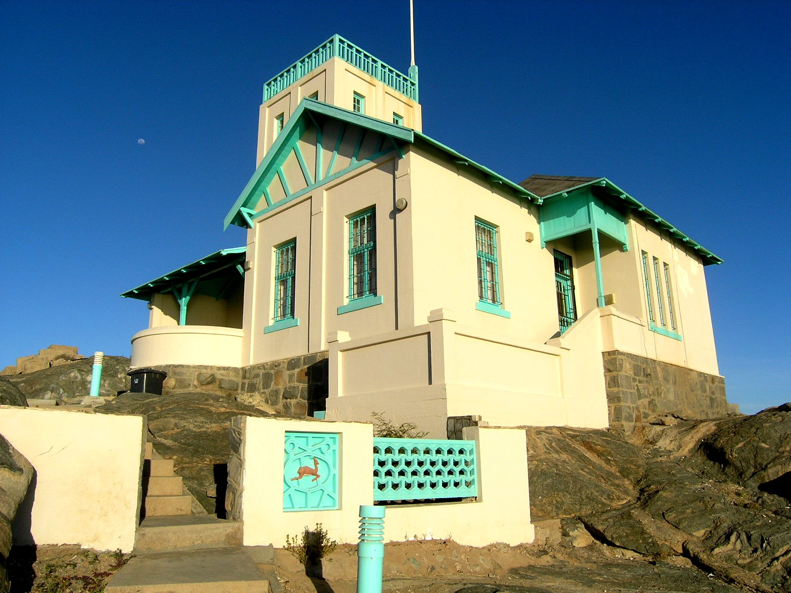 Luderitz, Leuchtturm auf der Haifischinsel